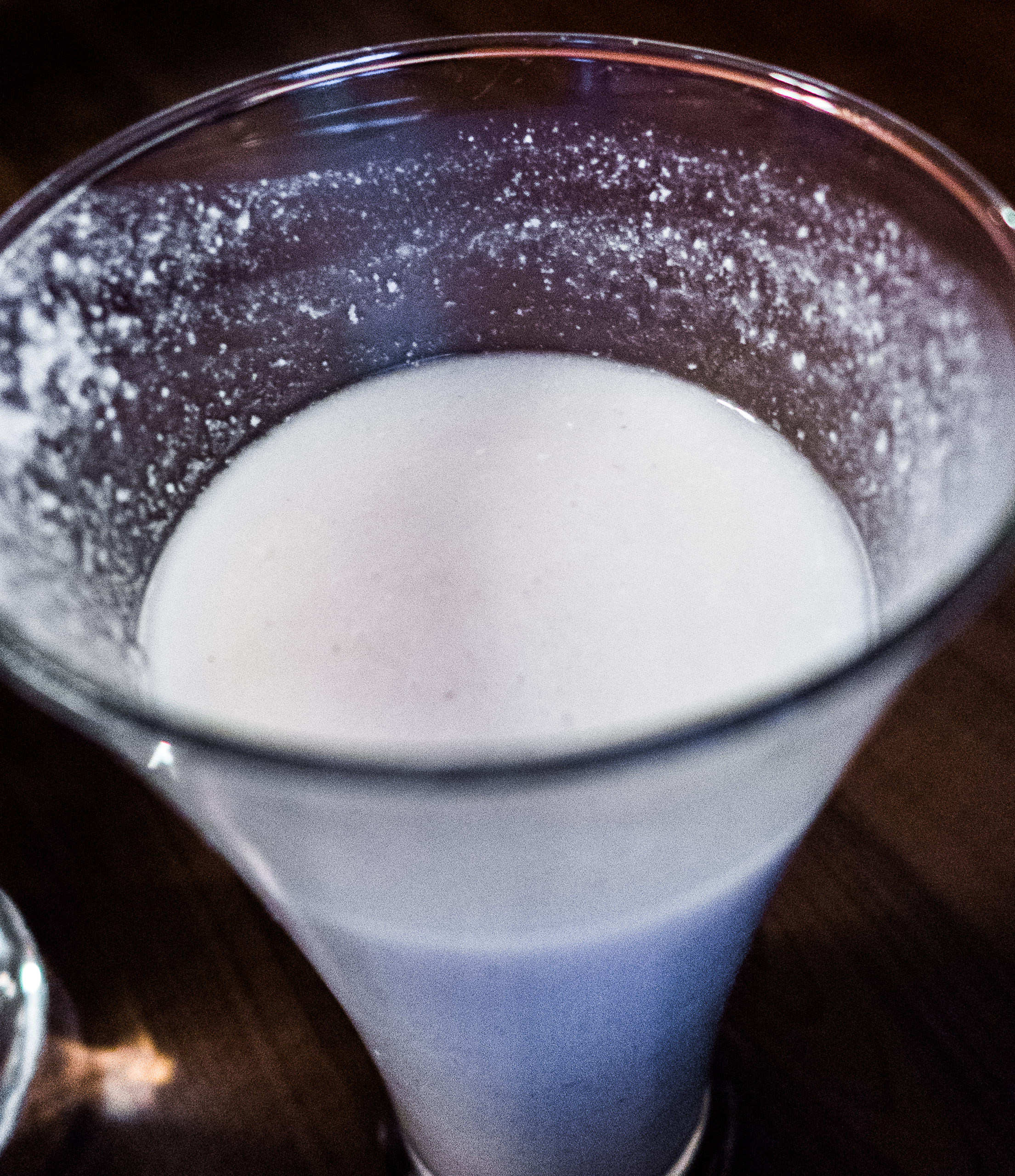 Chhyang or Chhaang - Fermented rice drink!